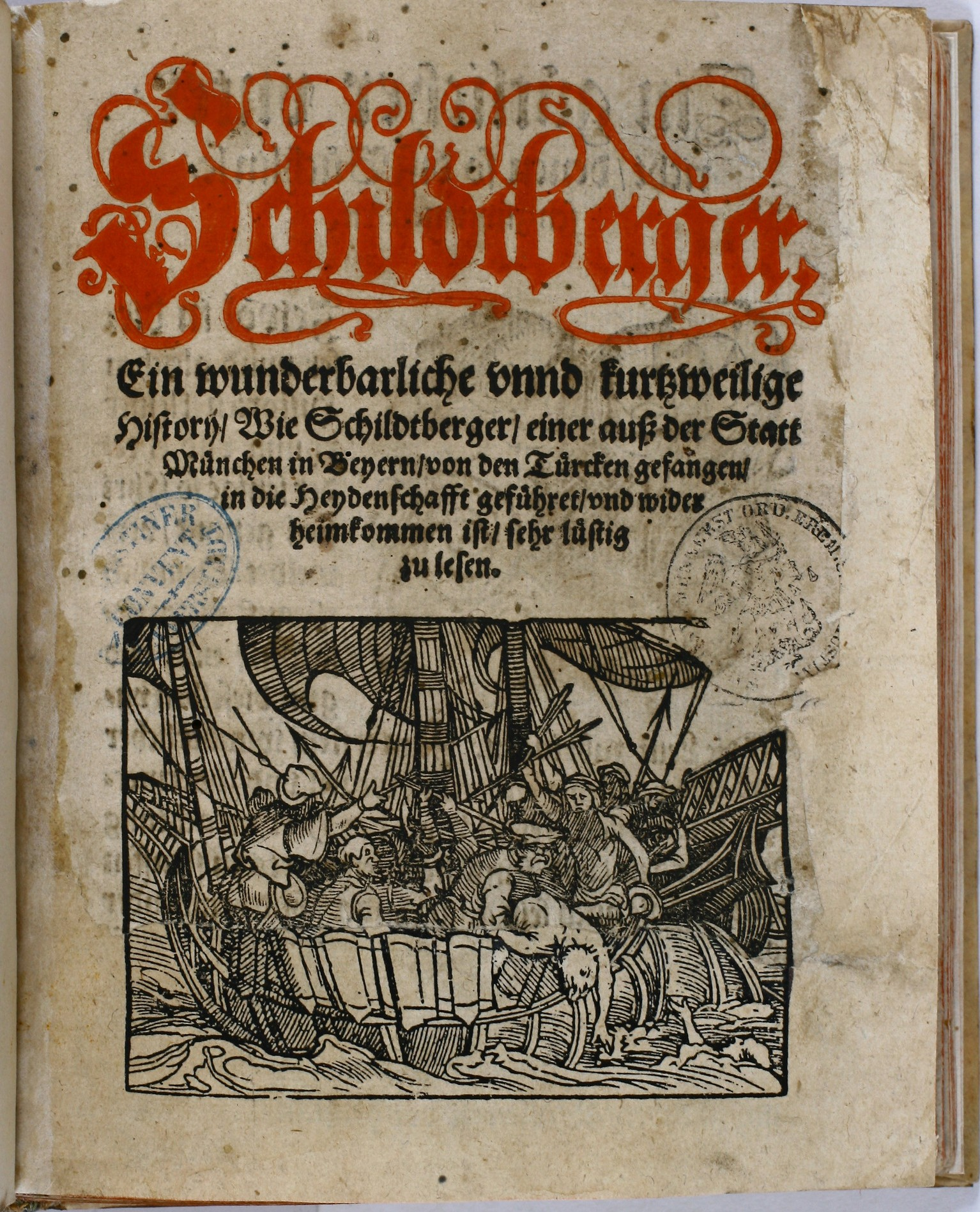 Ein wunderbarliche unnd kurtzweilige History, wie Schildtberger, einer außer der Statt München in Beyern, von den Türcken gefangen, in die Heydenschafft geführet, und wider heimkommen ist, sehr lüstig zu lesen. Frankfurt, W. Han Erben, ca. 1570. 4to (17,5:14,5 cm). Mit Titelholzschn. u. 35 teils wiederh. Textholzschn.